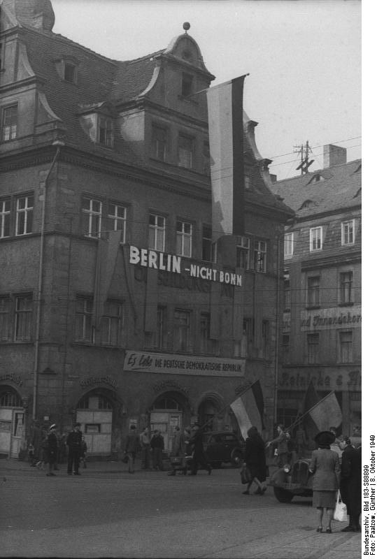 Halle, Marktplatz - Marktschlößchen, Parolen zur Gründung der DDR ADN-ZB/Paalzow/8.10.1949 Gründung der Deutschen Demokratischen Republik am 7.10.1949 Auf dem Hallmarkt in Halle fand am 8.10.1949 eine Kundgebung statt, auf der dieses historische Ereignis begrüßt wurde. [UBz:] Geschmückte Häuser in Halle [Halle, Hallmarkt.- Transparente zur Gründung der DDR an Haus ("Berlin - nicht Bonn" und "Es lebe die Deutsche Demokratische Republik")]